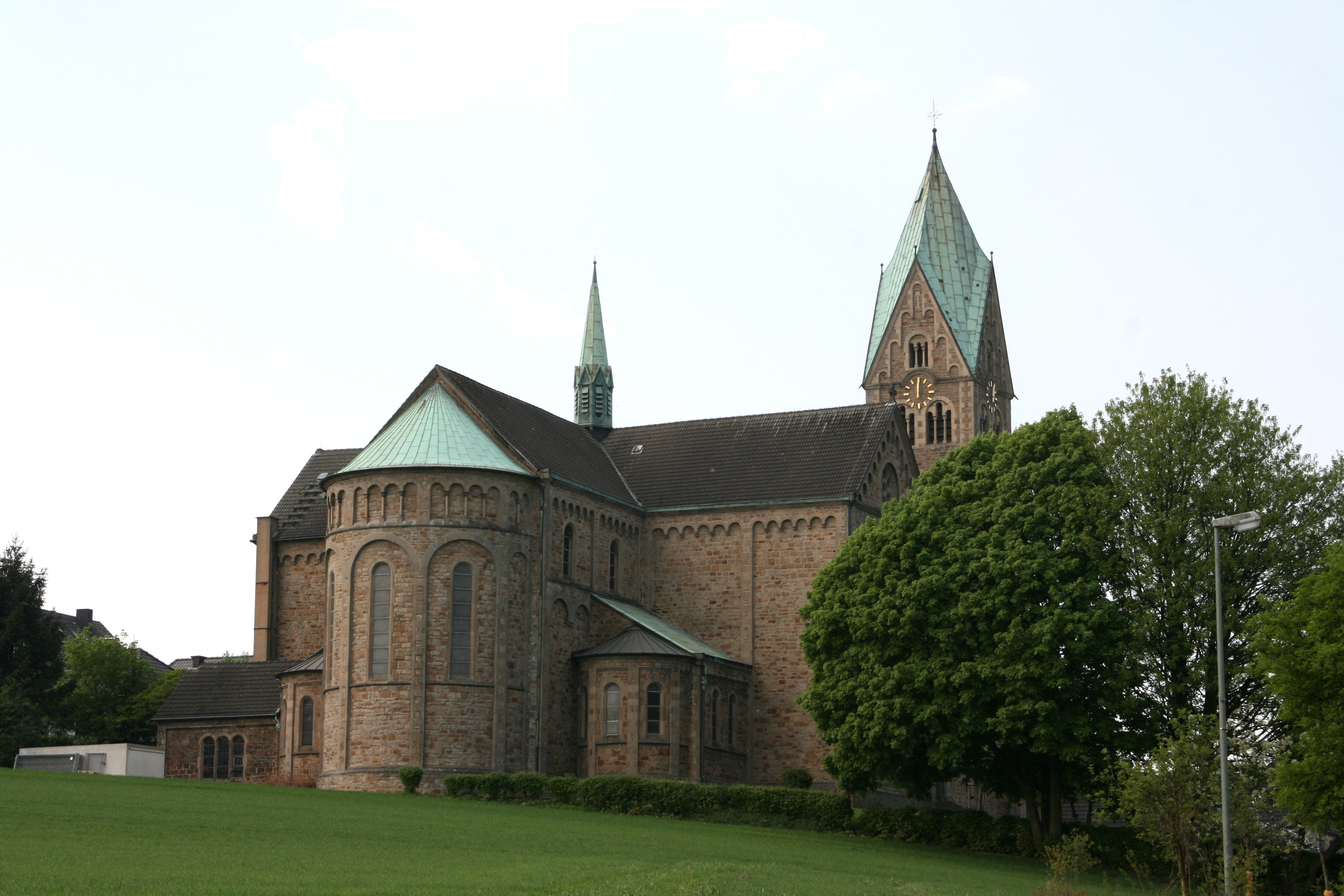 Kirche Herz Jesu, Alte Hauptstraße in Essen-Burgaltendorf